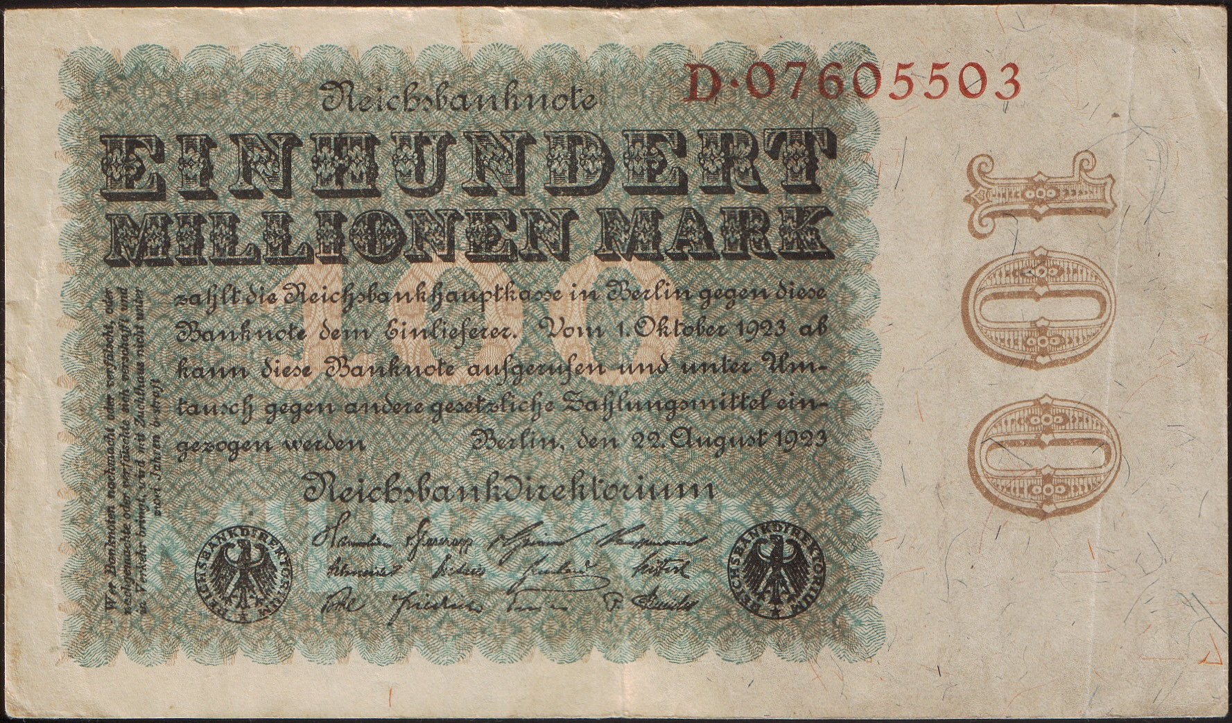 Description: 100 million Mark, printed in 1923 Source: scanned banknote Dimensions: Width: 14.9cm Height: 8.65cm Remarks: The back is wholly unprintable. Beschreibung: 100 Millionen Mark, gedruckt 1923 Quelle: Geldschein eingescannt Ausmaße: Breite: 14,9 cm Höhe: 8,65 cm Bemerkungen: Text der Vorderseite: Reichsbanknote EINHUNDERT MILLIONEN MARK zahlt die Reichsbankhauptkasse in Berlin gegen diese Banknote dem Einlieferer. Vom 1. Oktober 1923 ab kann diese Banknote aufgerufen und unter Umtausch gegen andere gesetzliche Zahlungsmittel eingezogen werden Berlin, den 22. Oktober 1923 Reichsbankdirektorium Seitlicher Text: Wer Banknoten nachmacht oder verfälscht, oder nachgemachte oder verfälschte sich verschafft und in Verkehr bringt, wird mit Zuchthaus nicht unter zwei Jahren bestraft Die Rückseite ist gänzlich unbedruckt.